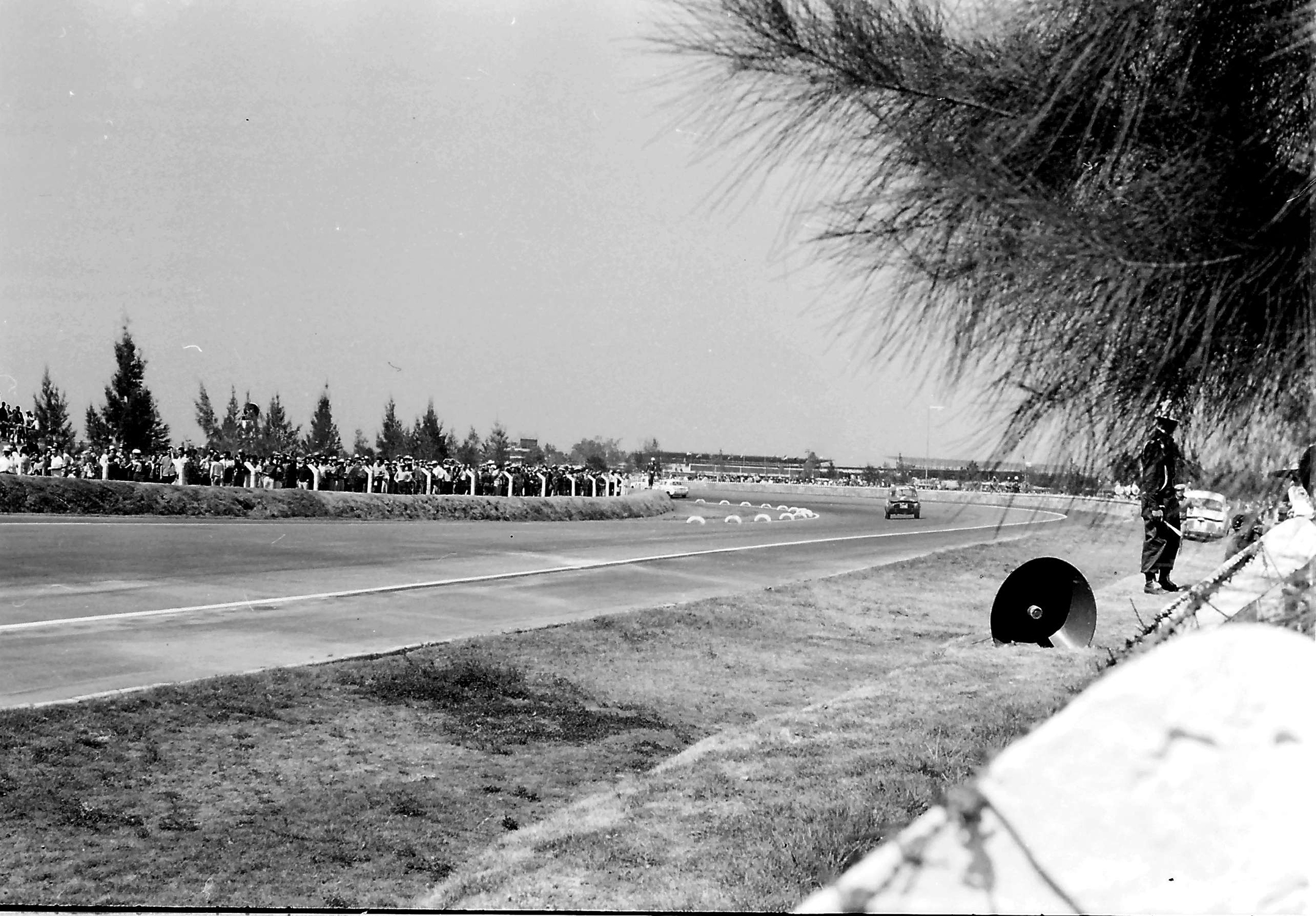 Fotografía antigua de la Ciudad de México resguardadas por el Museo Archivo de la Fotografía (MAF) de la Ciudad de México.